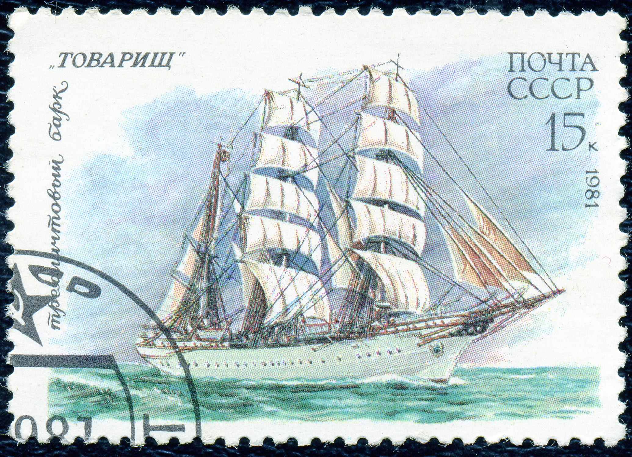 Почтовая марка СССР. 1981. Трёхмачтовый барк Товарищ